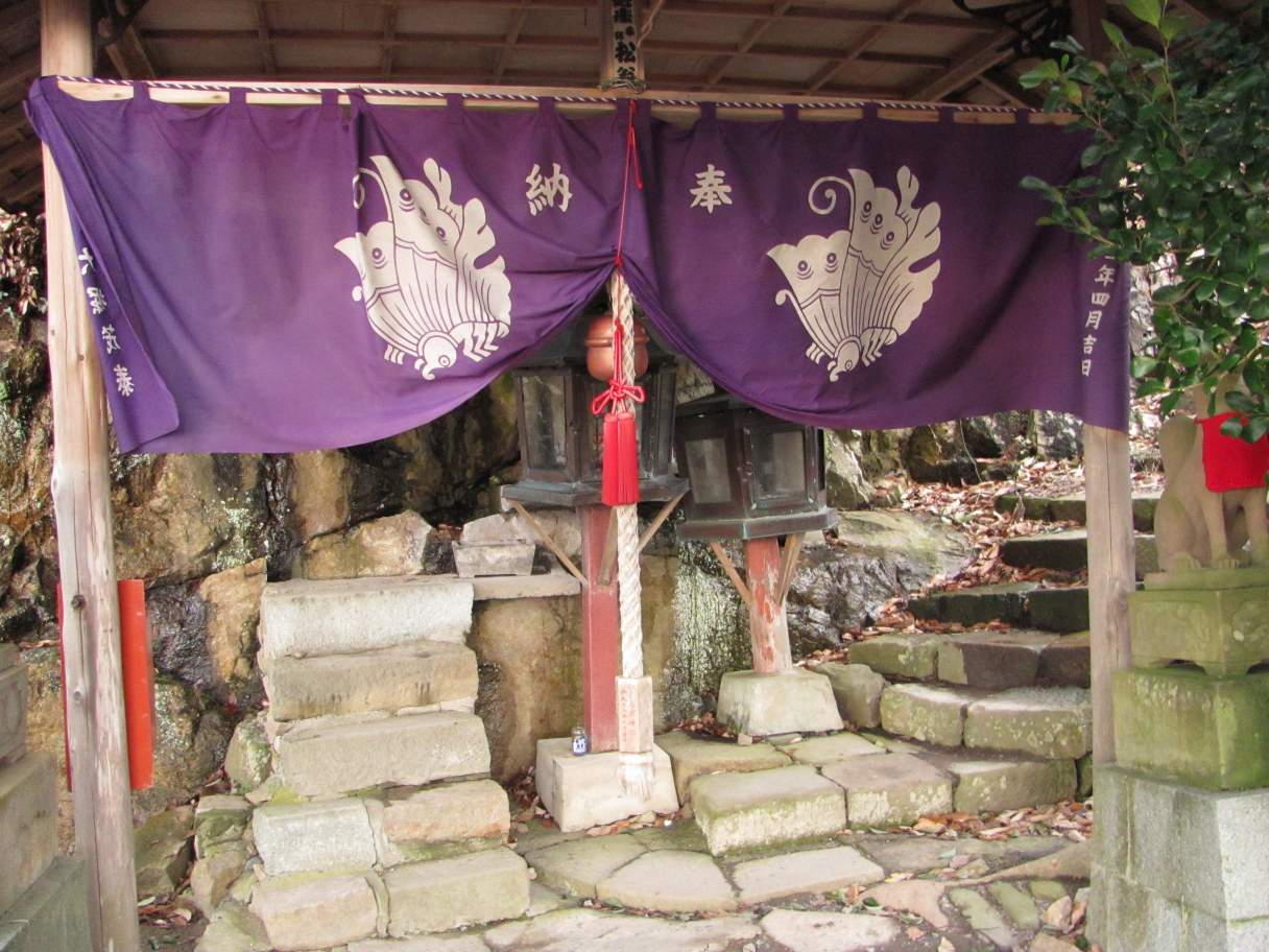 右奥にある石段を登ると鳥取城山上ノ丸への登山口に出る。